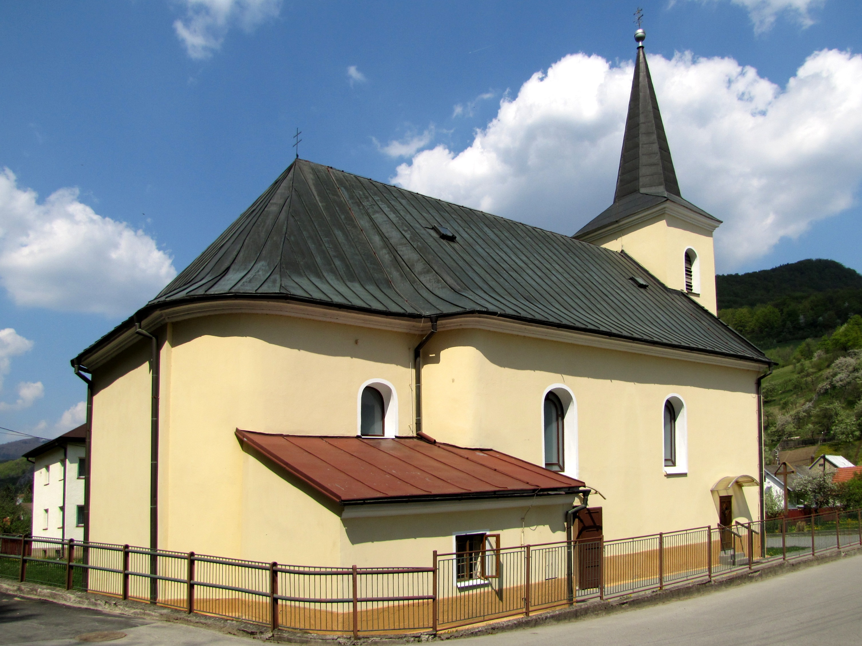 Kostel Neposkvrněného početí Panny Marie z let 1795-1796 v obci Červený Kameň na Slovensku, okres Ilava, Trenčínský kraj